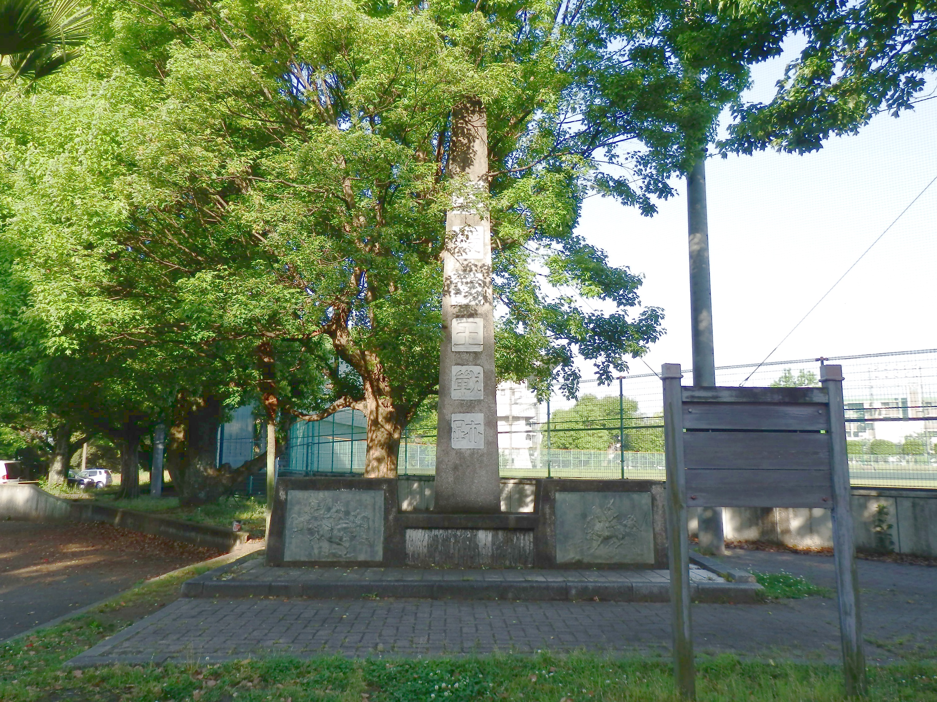 託麻原古戦場、「天授勤王戦跡」碑（熊本県熊本市）